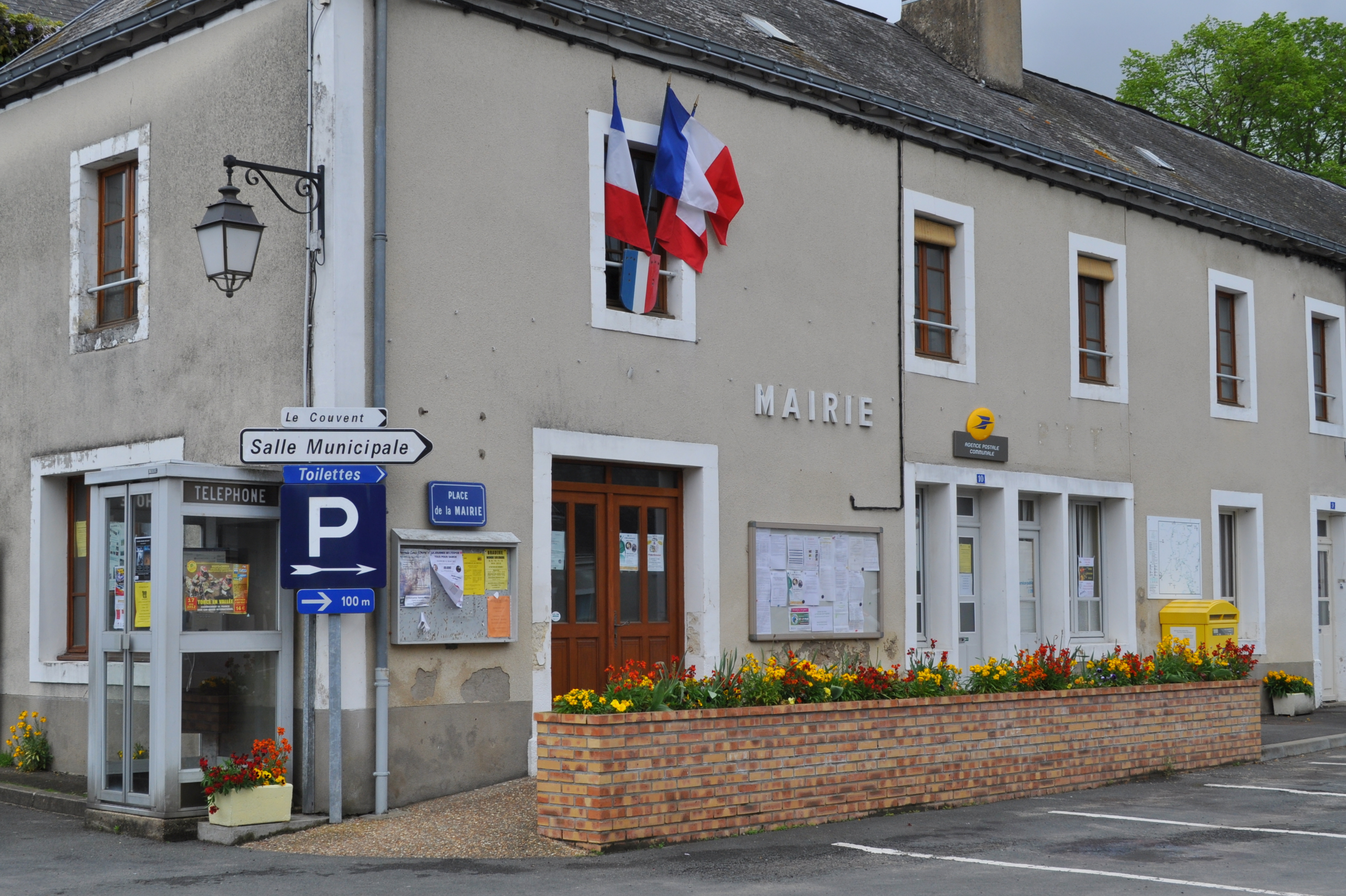 Mairie de La Fontaine-Saint-Martin (Sarthe)